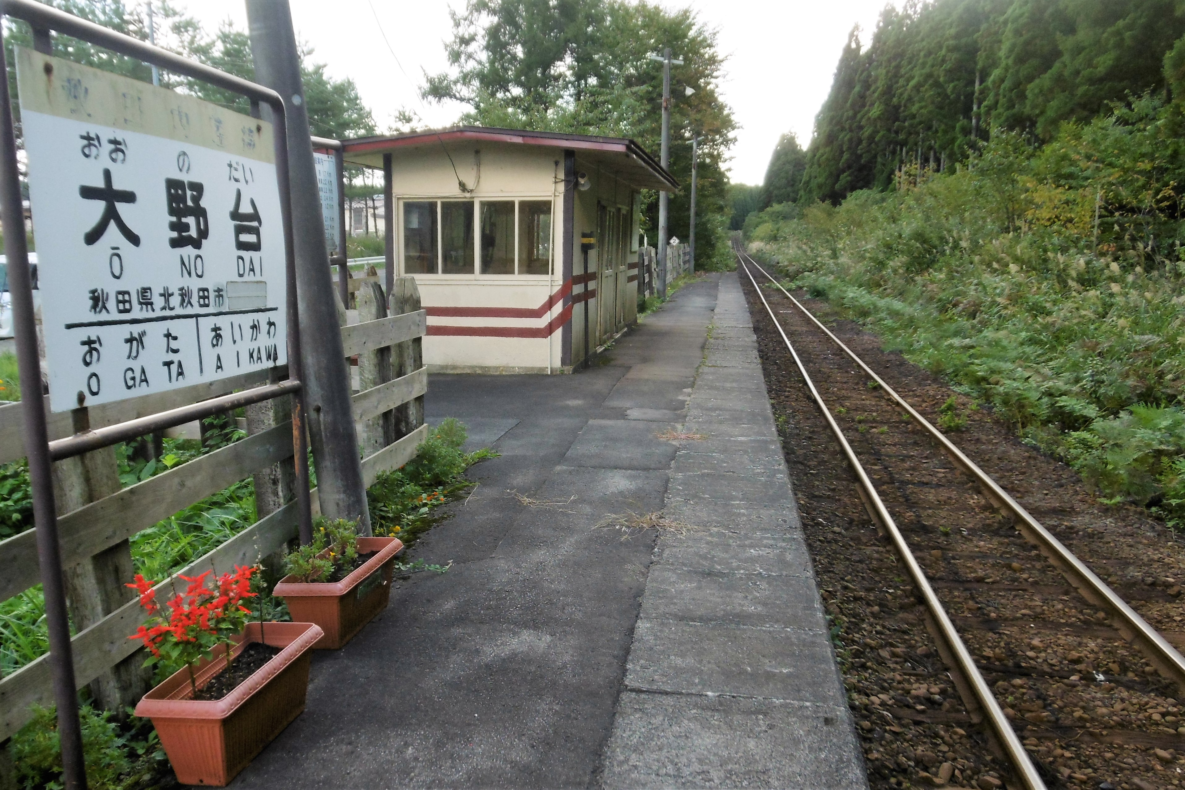 秋田内陸線・大野台駅